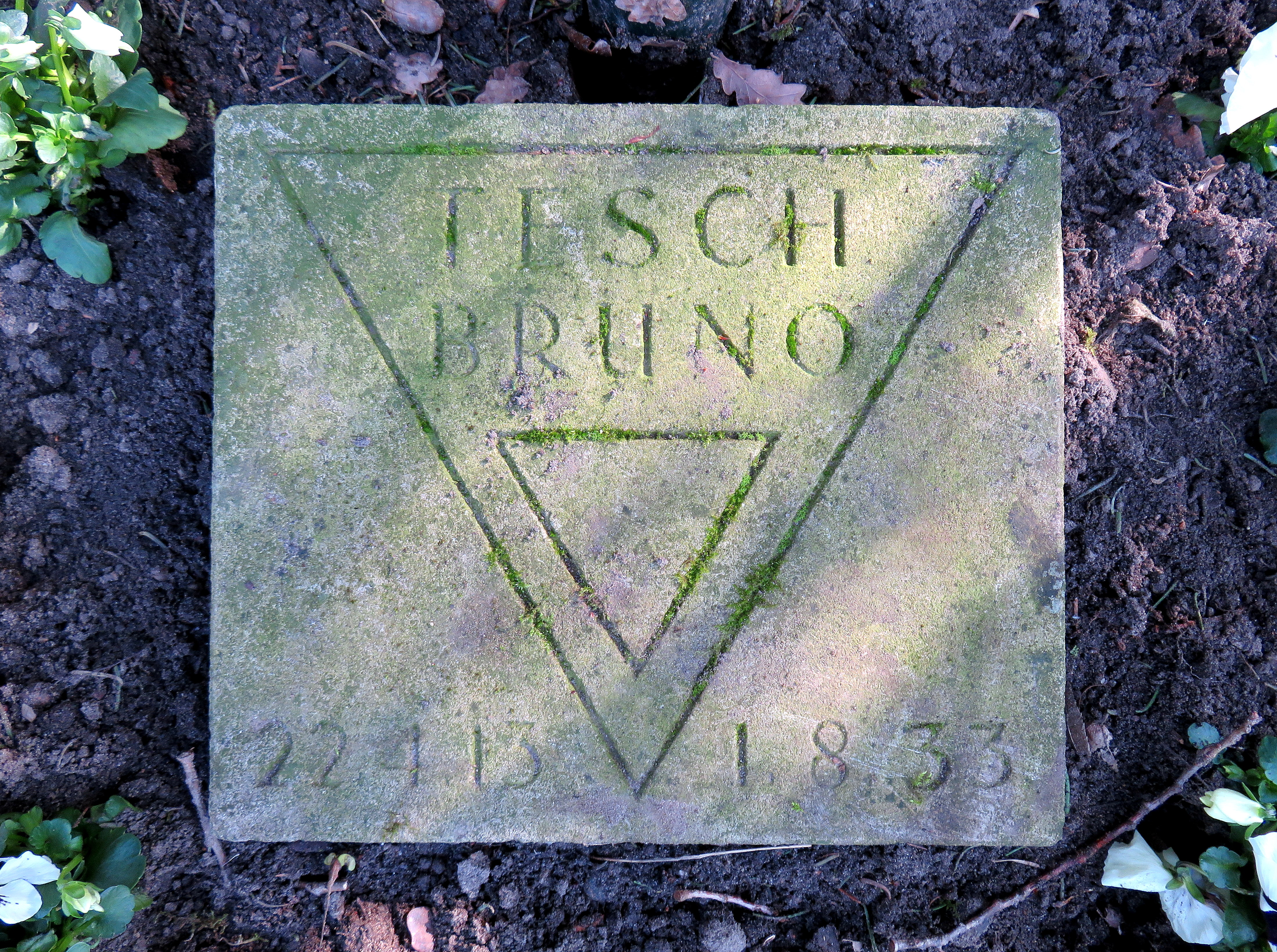 Kissenstein für den deutschen Widerstandskämpfer Bruno Tesch im Ehrenhain Hamburgischer Widerstandskämpfer, Friedhof Ohlsdorf, Planquadrat K 5 (Bergstraße gegenüber dem Museum).